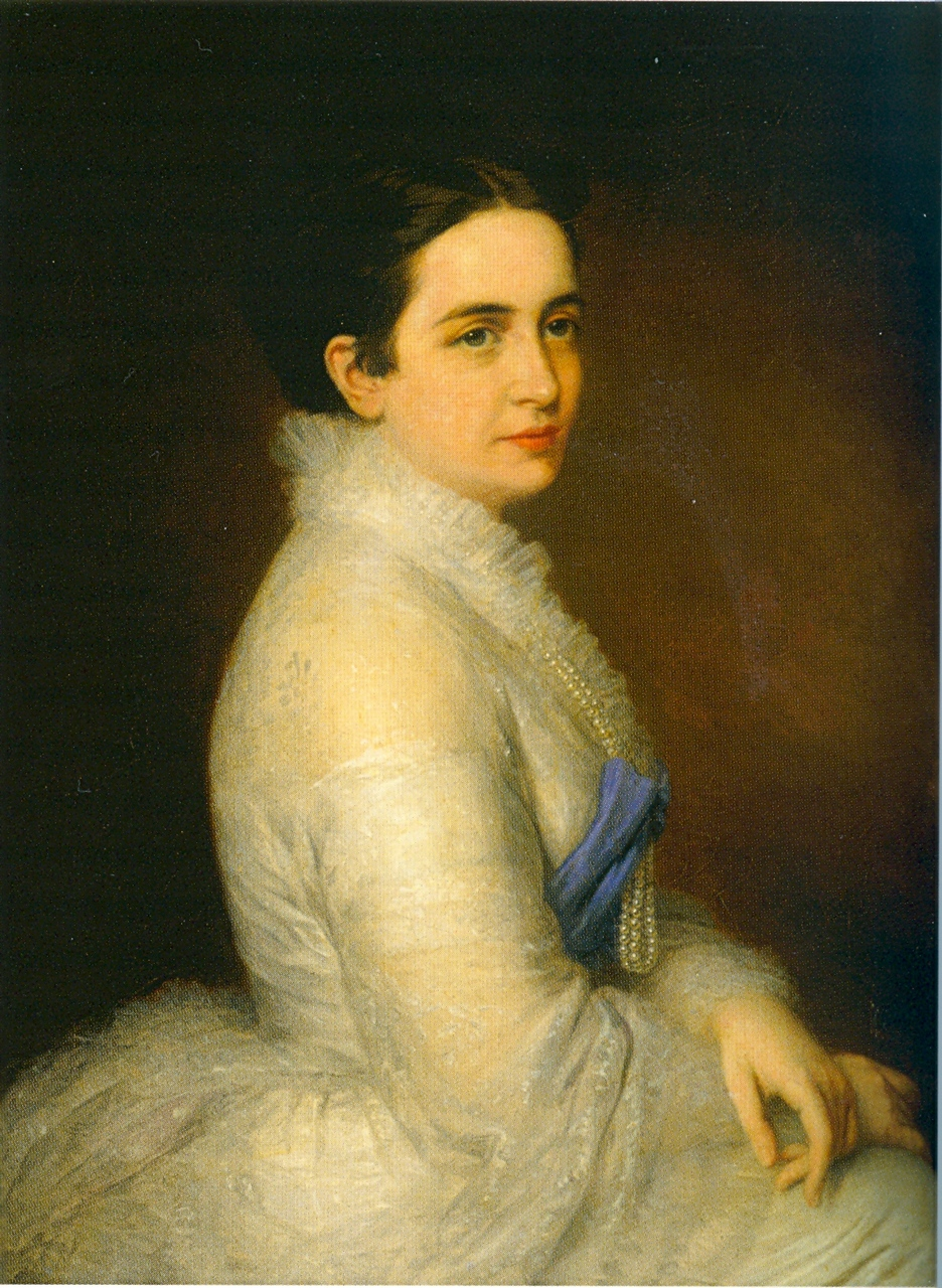 Bittó Irma, Bittó István magyar politikus, miniszterelnök felesége.